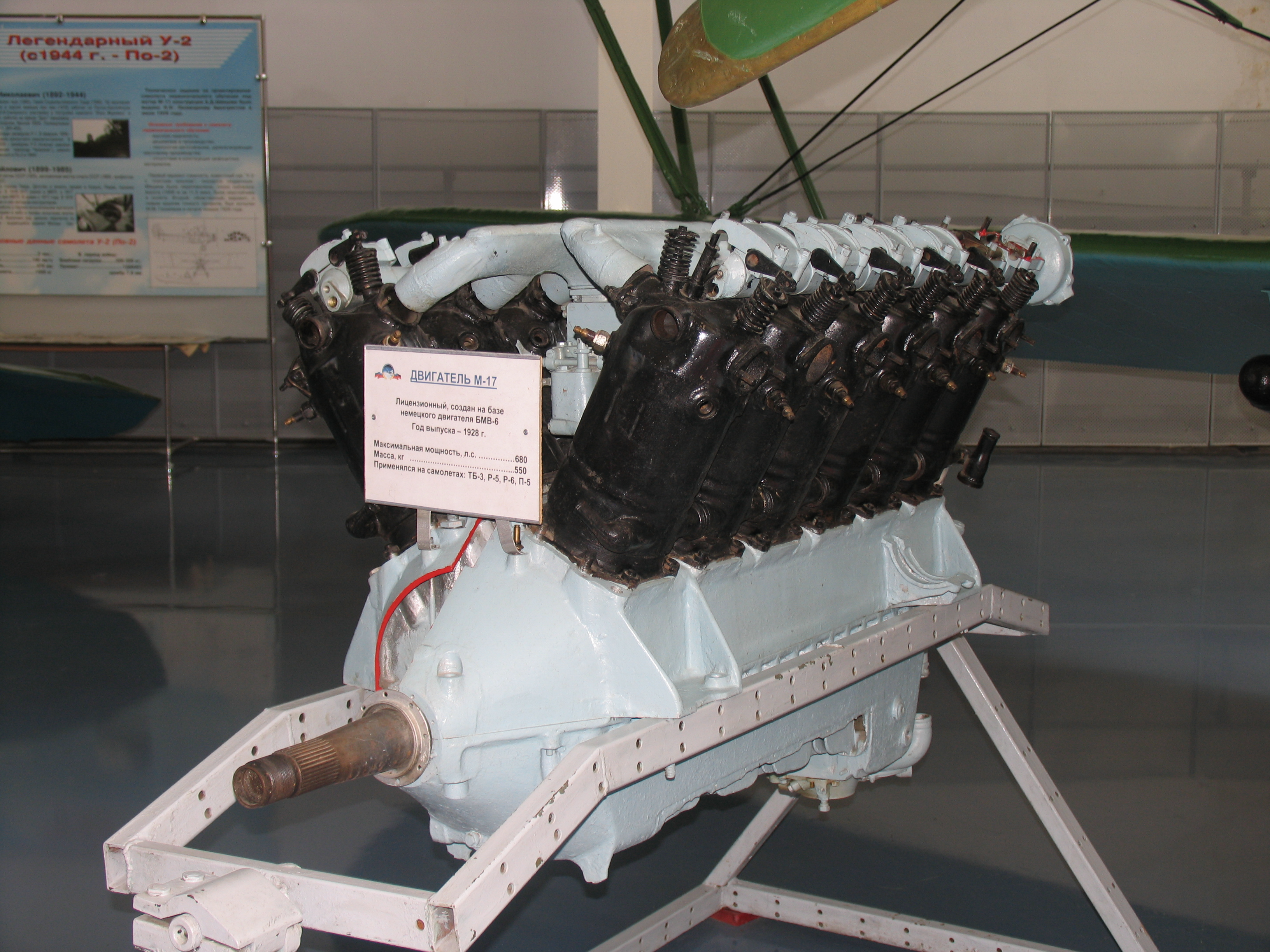 Двигатель М-17. Музей ВВС.